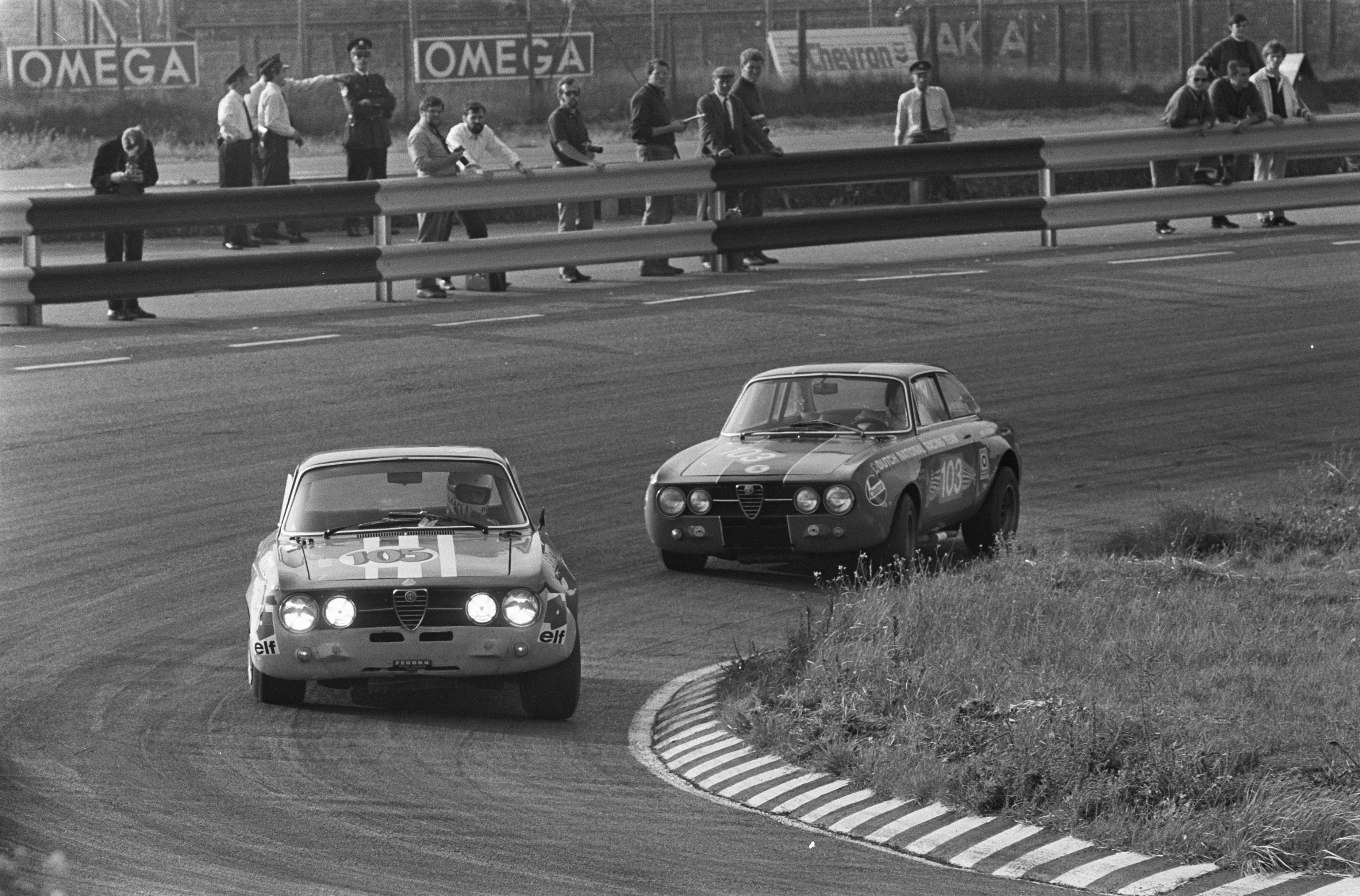 Collectie / Archief : Fotocollectie Anefo Reportage / Serie : [ onbekend ] Beschrijving : Nationale autoraces, Zandvoort; links T. Hezemans en Nico Chiotakis in aktie in Alfa Romeo 1750 GTAM Datum : 9 augustus 1970 Locatie : Noord-Holland, Zandvoort Trefwoorden : AUTORACES Persoonsnaam : Hezemans, T., Nico Chiotakis Fotograaf : Koch, Eric / Anefo Auteursrechthebbende : Nationaal Archief Materiaalsoort : Negatief (zwart/wit) Nummer archiefinventaris : bekijk toegang 2.24.01.05 Bestanddeelnummer : 923-7381